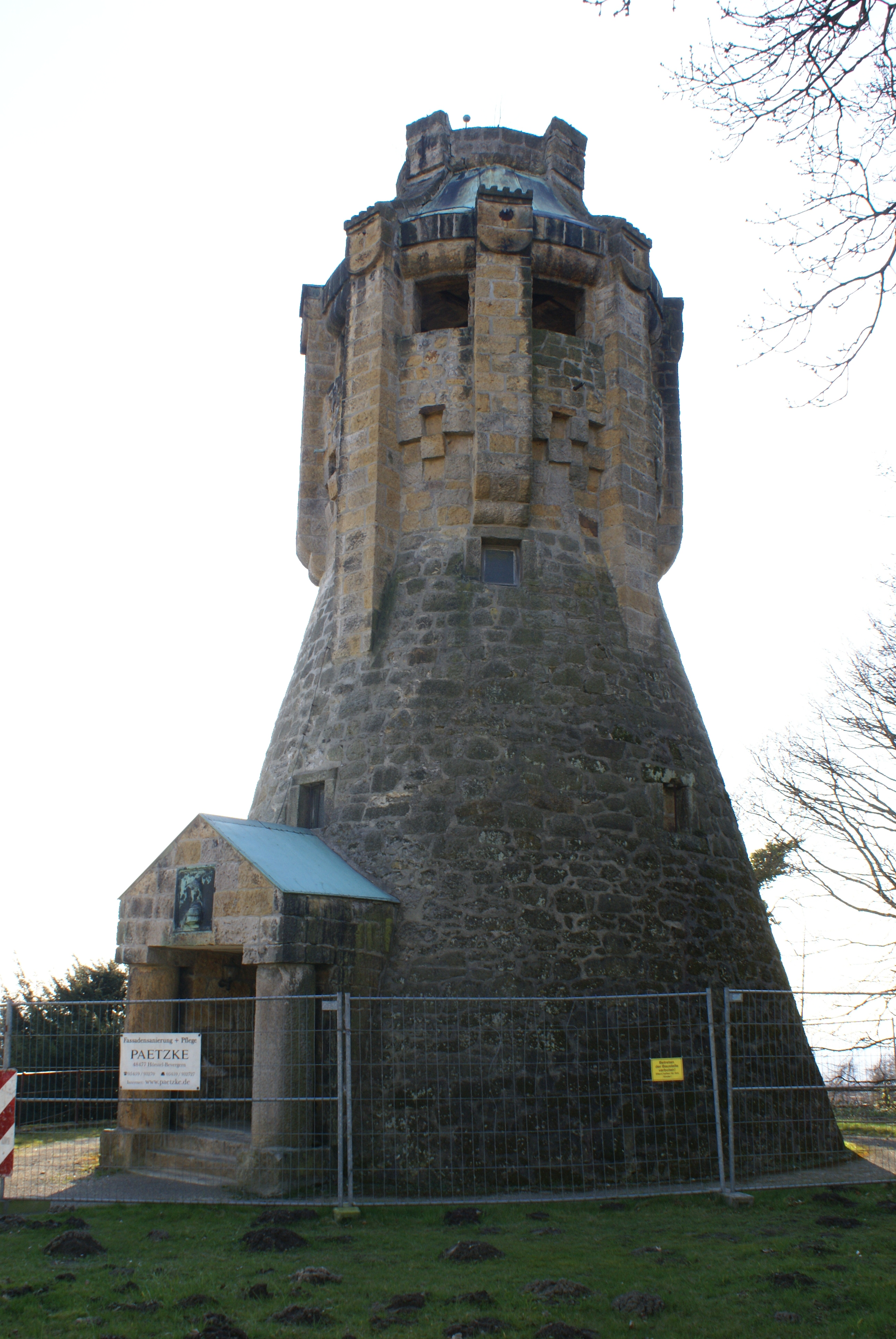 Bismarckturm in Tecklenburg This is a photograph of an architectural monument.